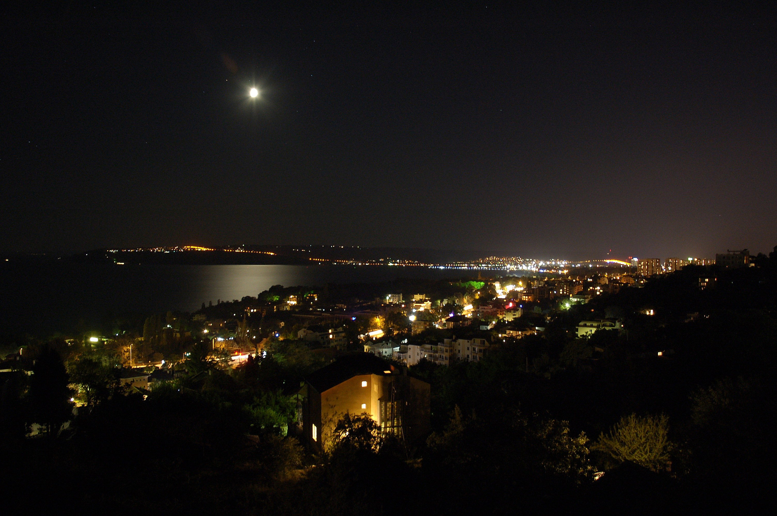 Fantastic night view from Sveti Nikola to Varna, 2009